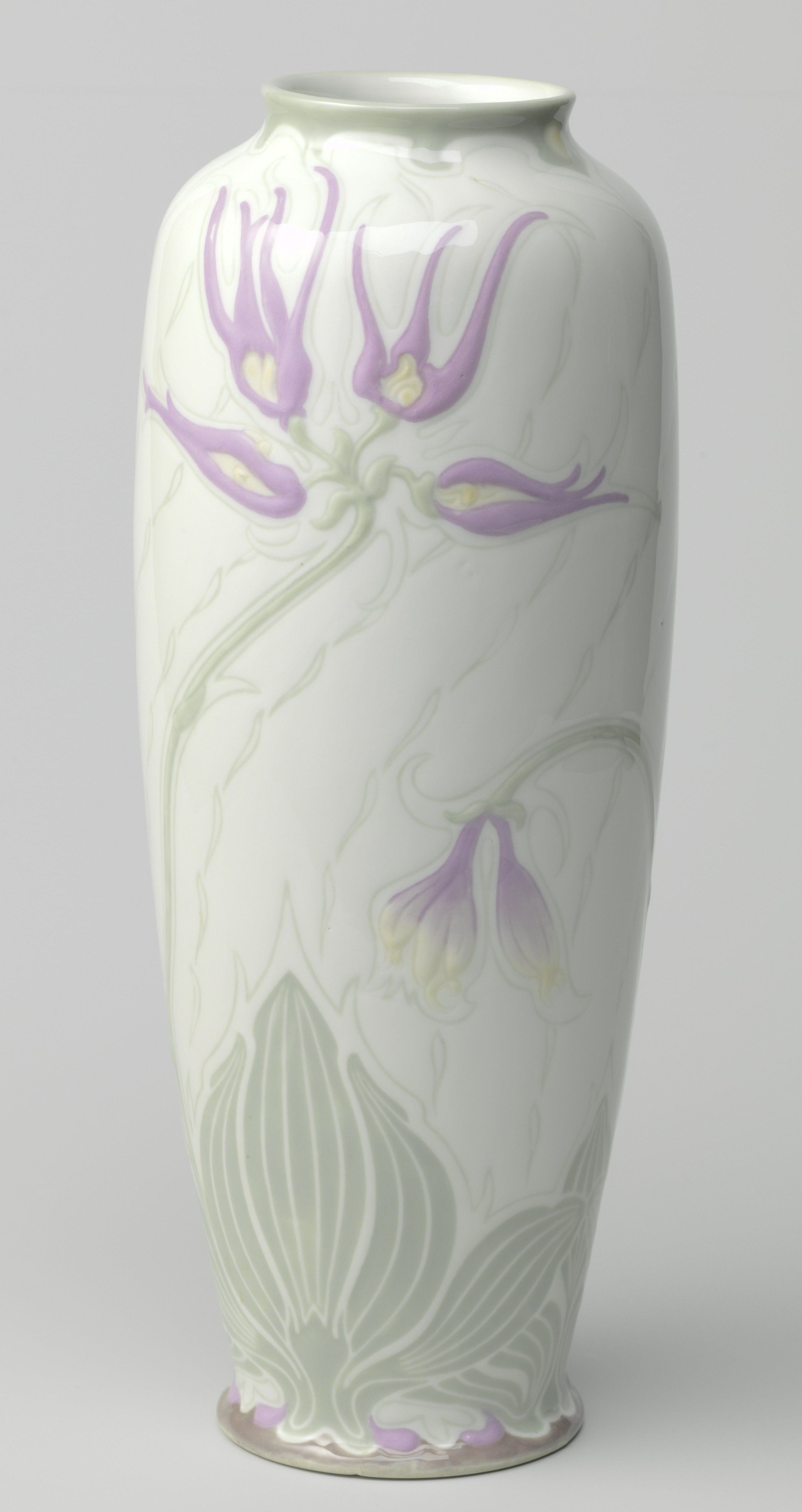 IdentificatieTitel(s): Vaas met veelkleurig décorObjecttype: vaas Objectnummer: BK-1974-84Opschriften / Merken: merk, onderzijde vaas: ‘twee stempels in groen: E. Colonna en monogram ANB voor Art Nouveau Bing, beide in rechthoek, Waar: onder het woord Leuconoë en het cijfer 2. Ingestempeld 500.’Omschrijving: Vaas van porselein met veelkleurig pâte-sur-pâte décor in groen, geel, paars en rose. De mondrand is groen, de voetrand paars. Gemerkt met: twee stempels in groen: E. Colonna en monogram ANB voor Art Nouveau Bing, beide in rechthoek, waaronder het woord Leuconoë en het cijfer 2. Ingestempeld 500.VervaardigingVervaardiger: vervaardiger: Fabriek Gérard et Duffraisseixontwerper: Edward ColonnaDatering: ca. 1900Materiaal: porselein Techniek: pâte-sur-pâteAfmetingen: h 30,4 cm. × d 12,0 cm. Verwerving en rechtenVerwerving: aankoop 1974Copyright: Publiek domein